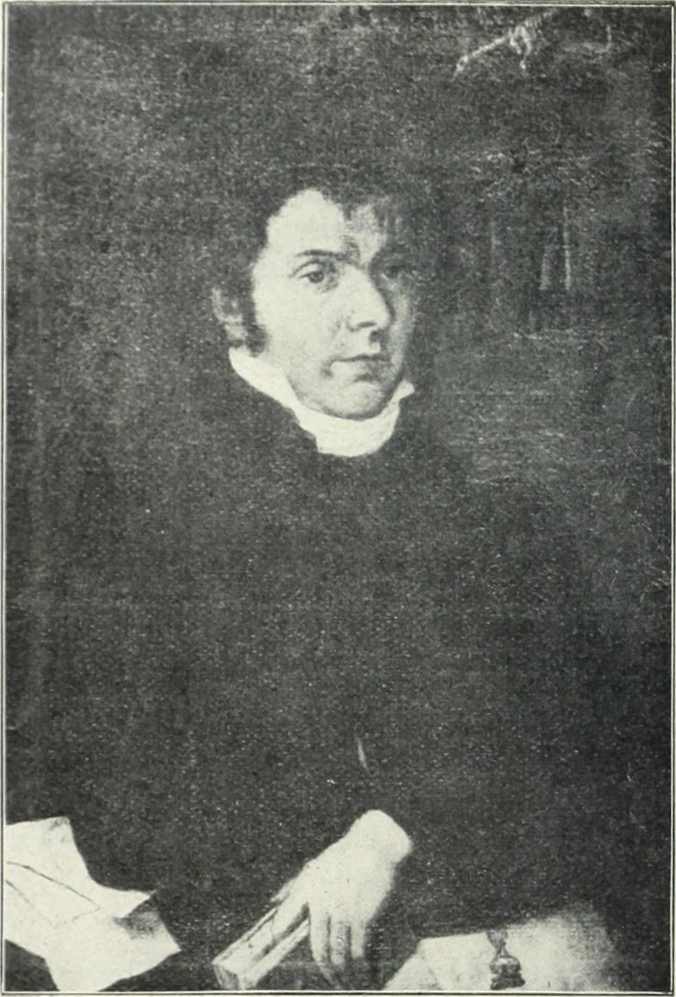 Slika 19: Leopold Layer - Anton Hayne.